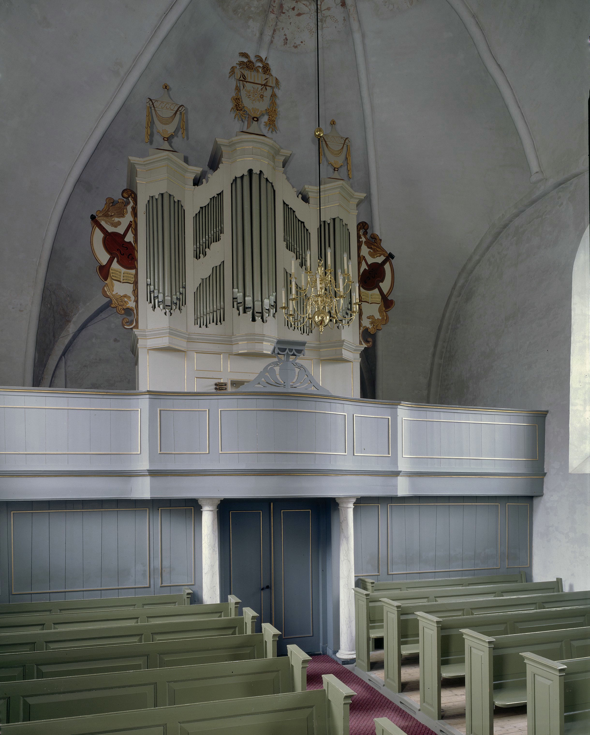 Nederlands Hervormde Kerk: Interieur, aanzicht orgel, orgelnummer 1356 (opmerking: Gefotografeerd voor Het Historische Orgel in Nederland 1819-1840, bladzijde 93)